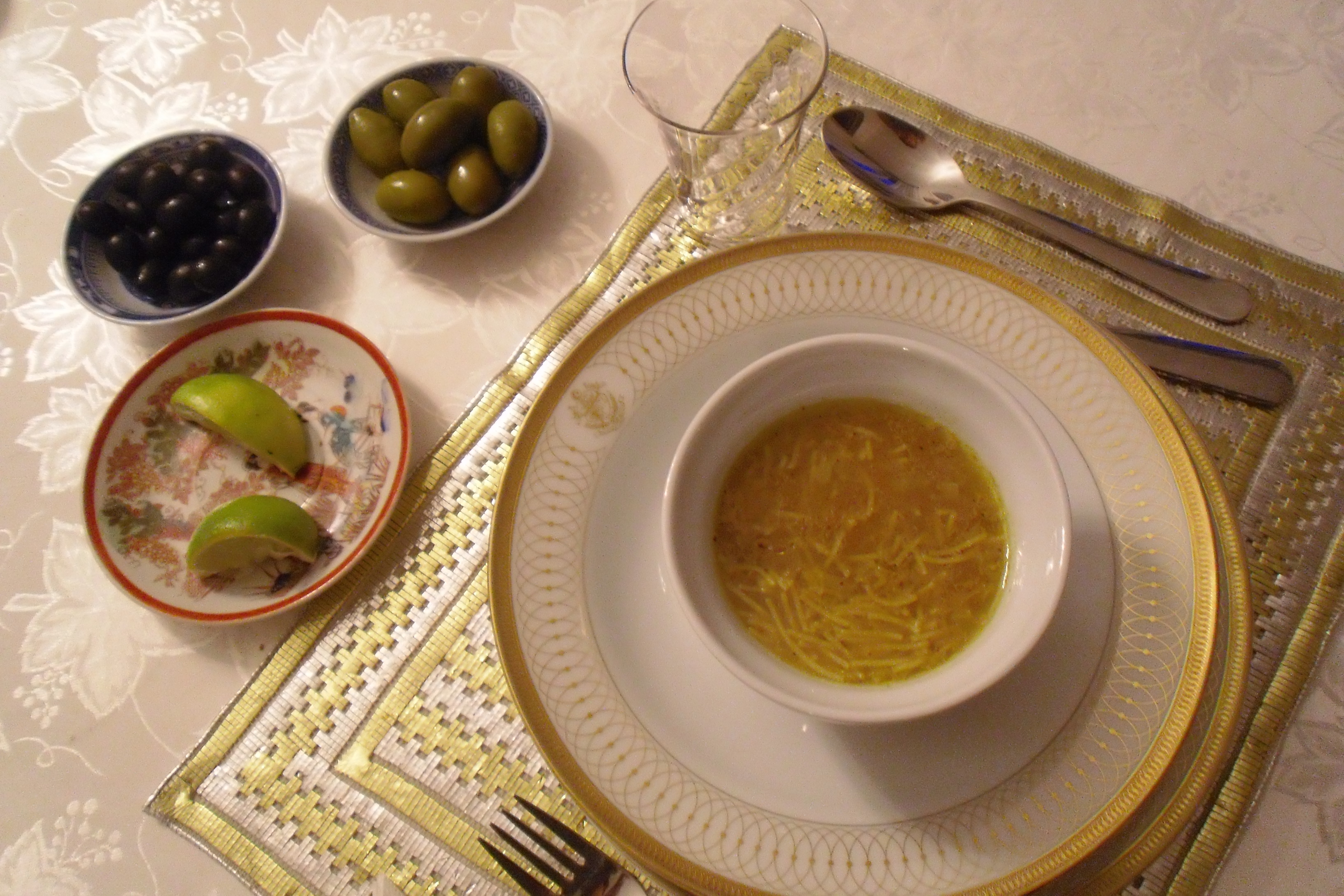 Assiette de chorba zaara